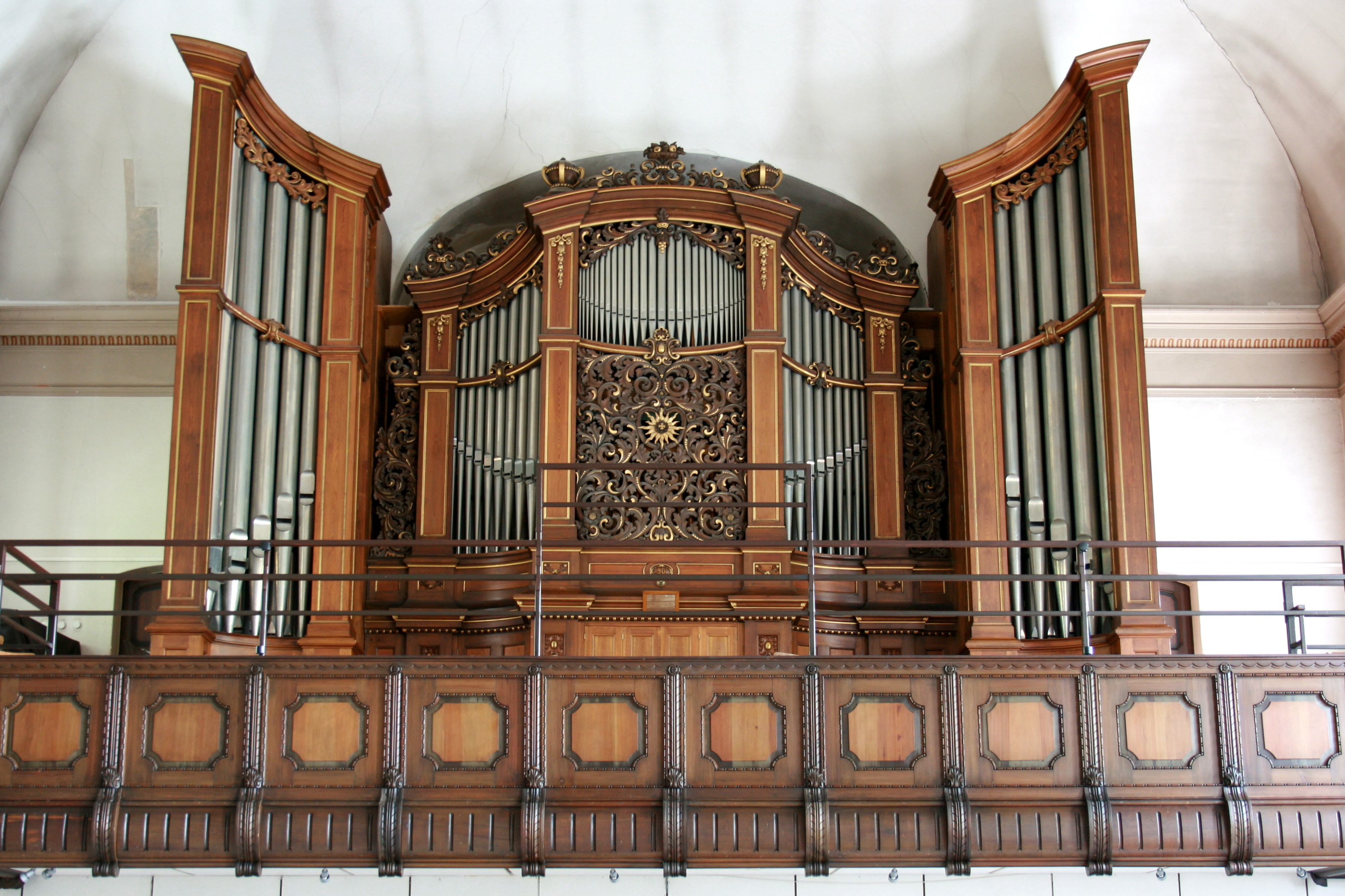 St. Johannis in Soltau